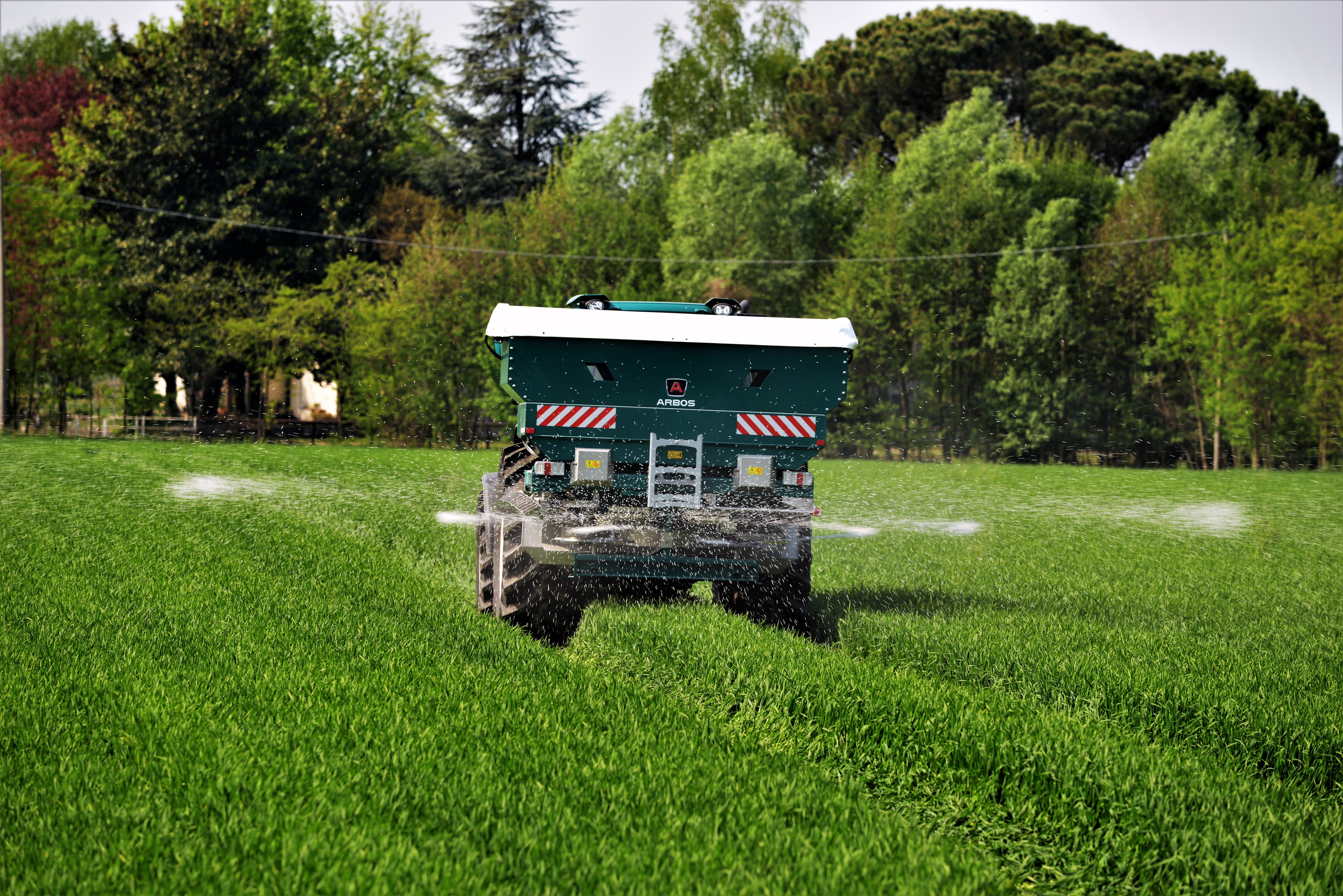 spandiconcime